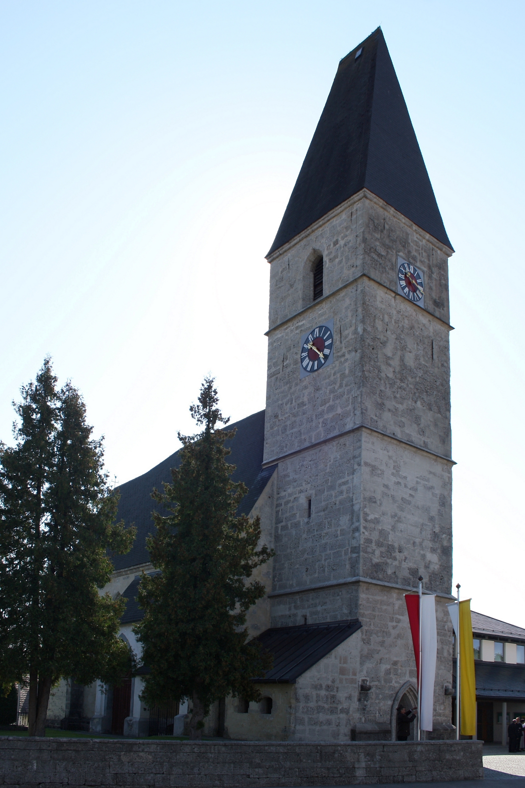 Pfarrkirche der oberösterreichischen Gemeinde Kirchham.